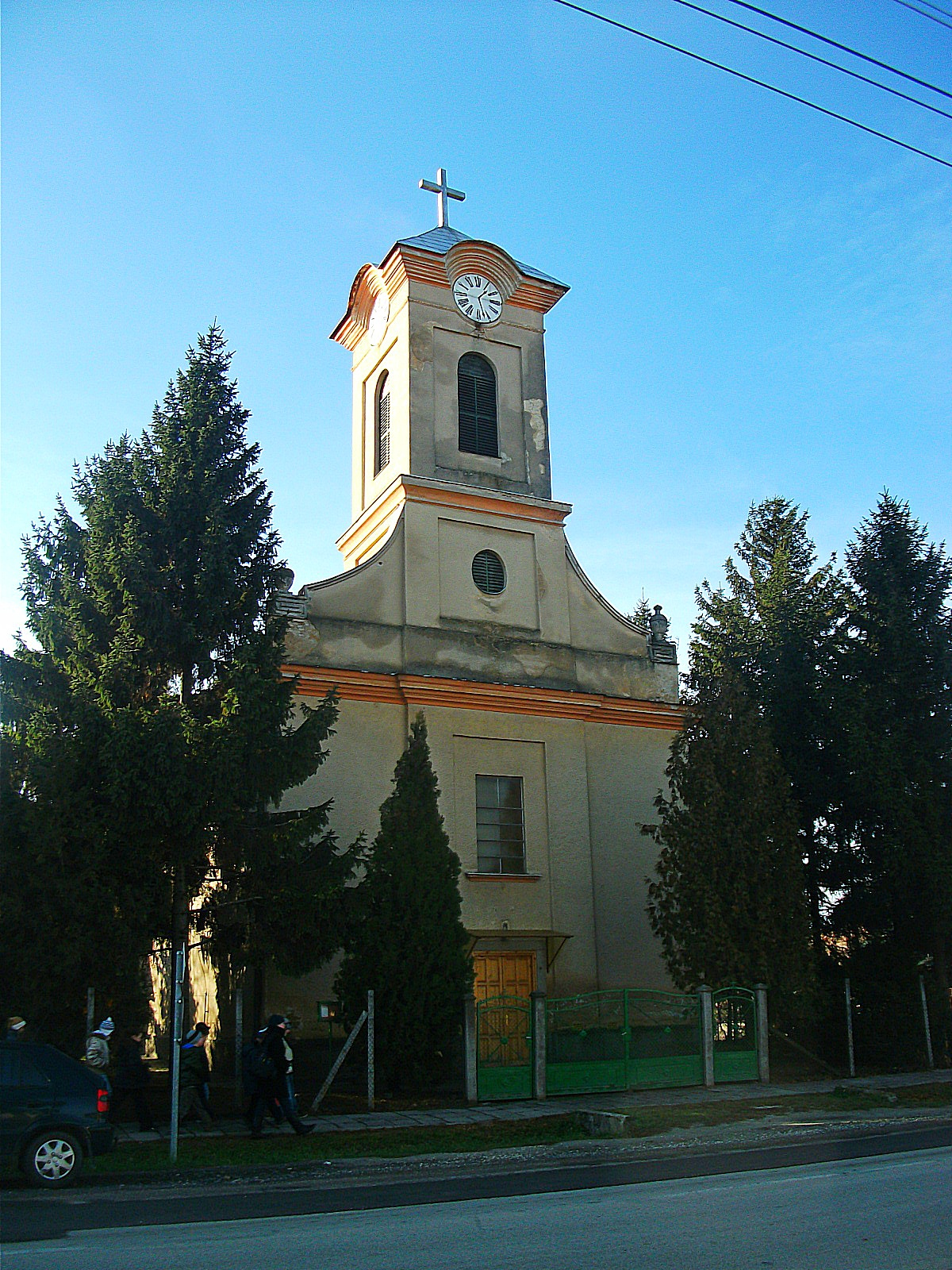 A seregélyesi római katolikus templom.